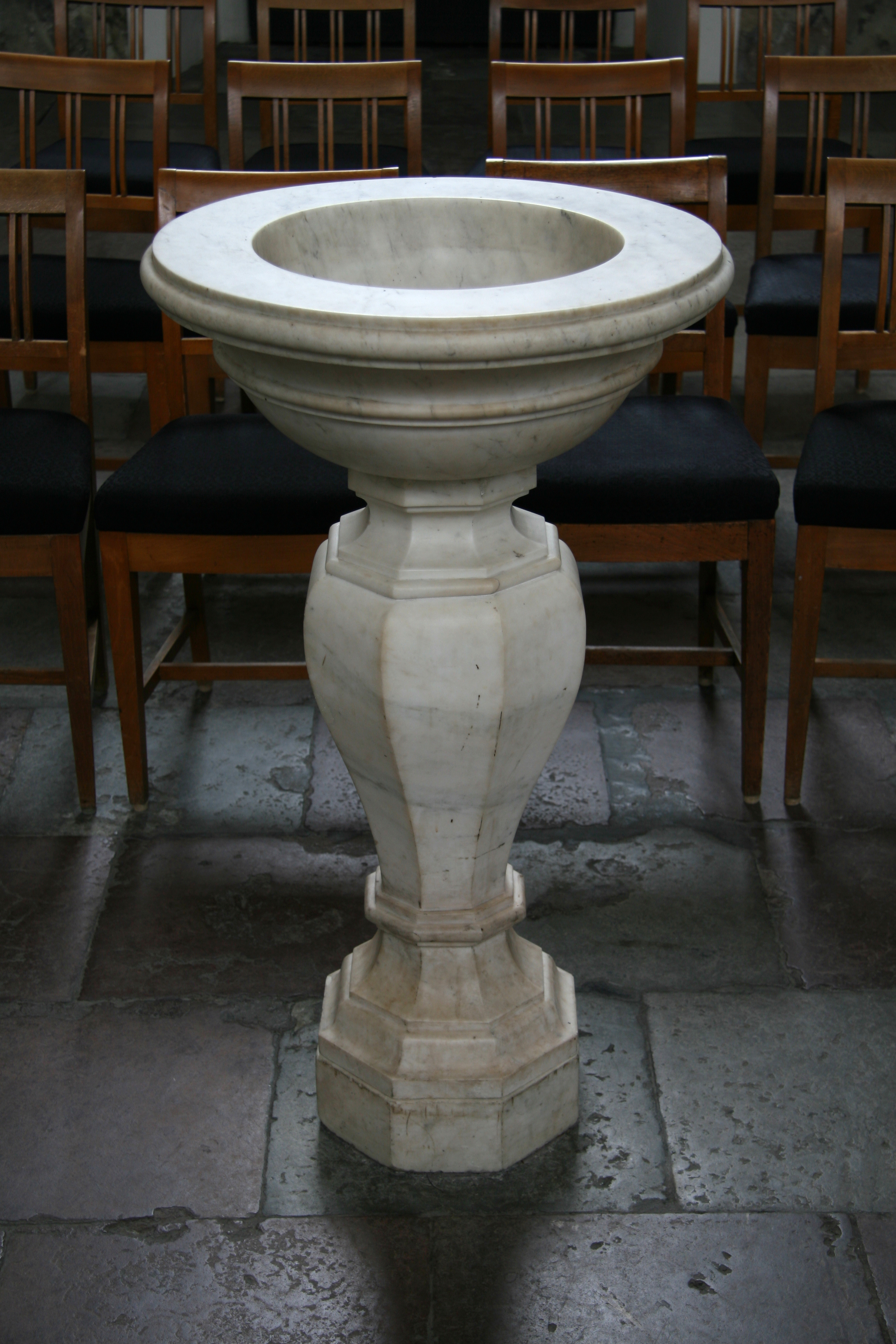 Trinitatis Kirke, Copenhagen, Denmark. Diderik Gerckens døbefont fra 1731.